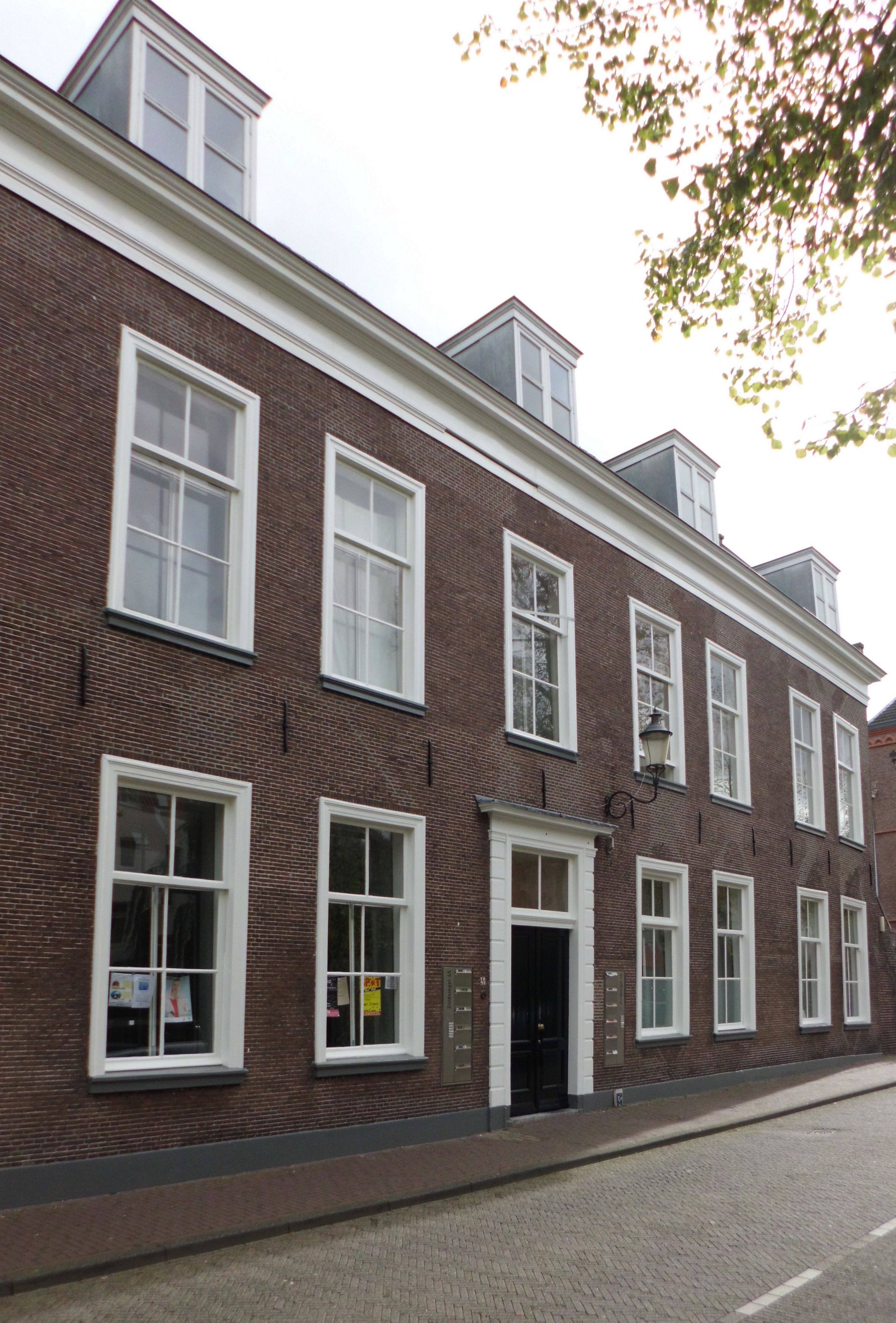 Zuidsingel 45 Amersfoort